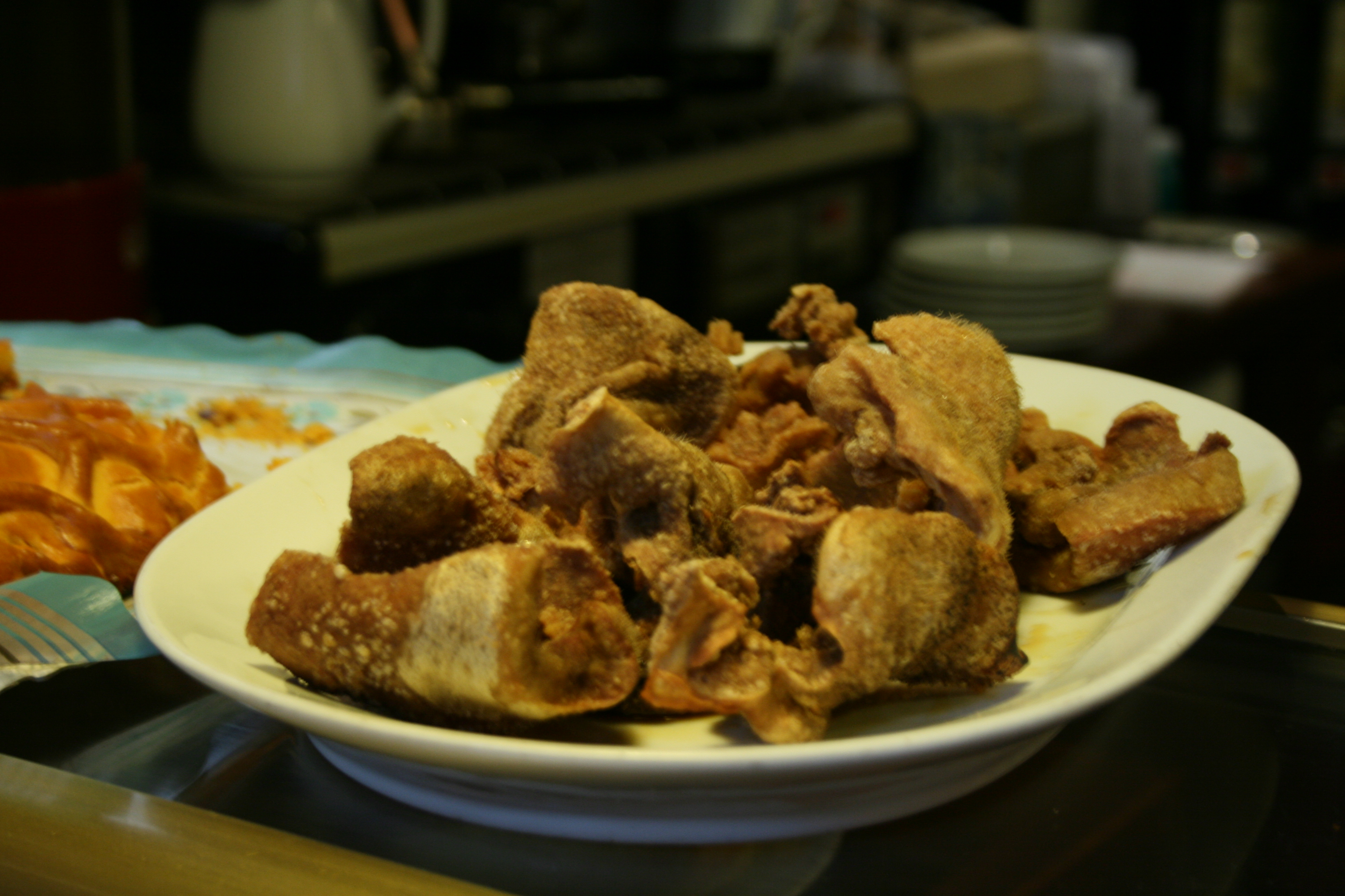 Torreznos (Piel de cerdo frita)